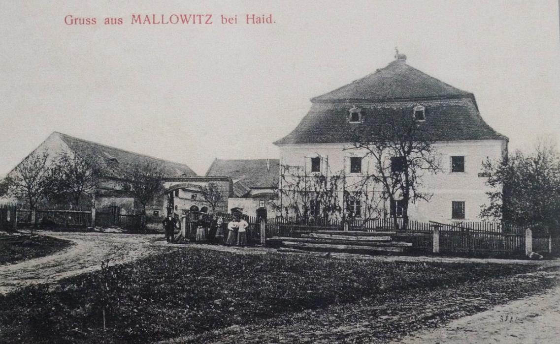 Bývalá tvrz Švamberků a lovecký dům Löwensteinů na pohlednici z r. 1908